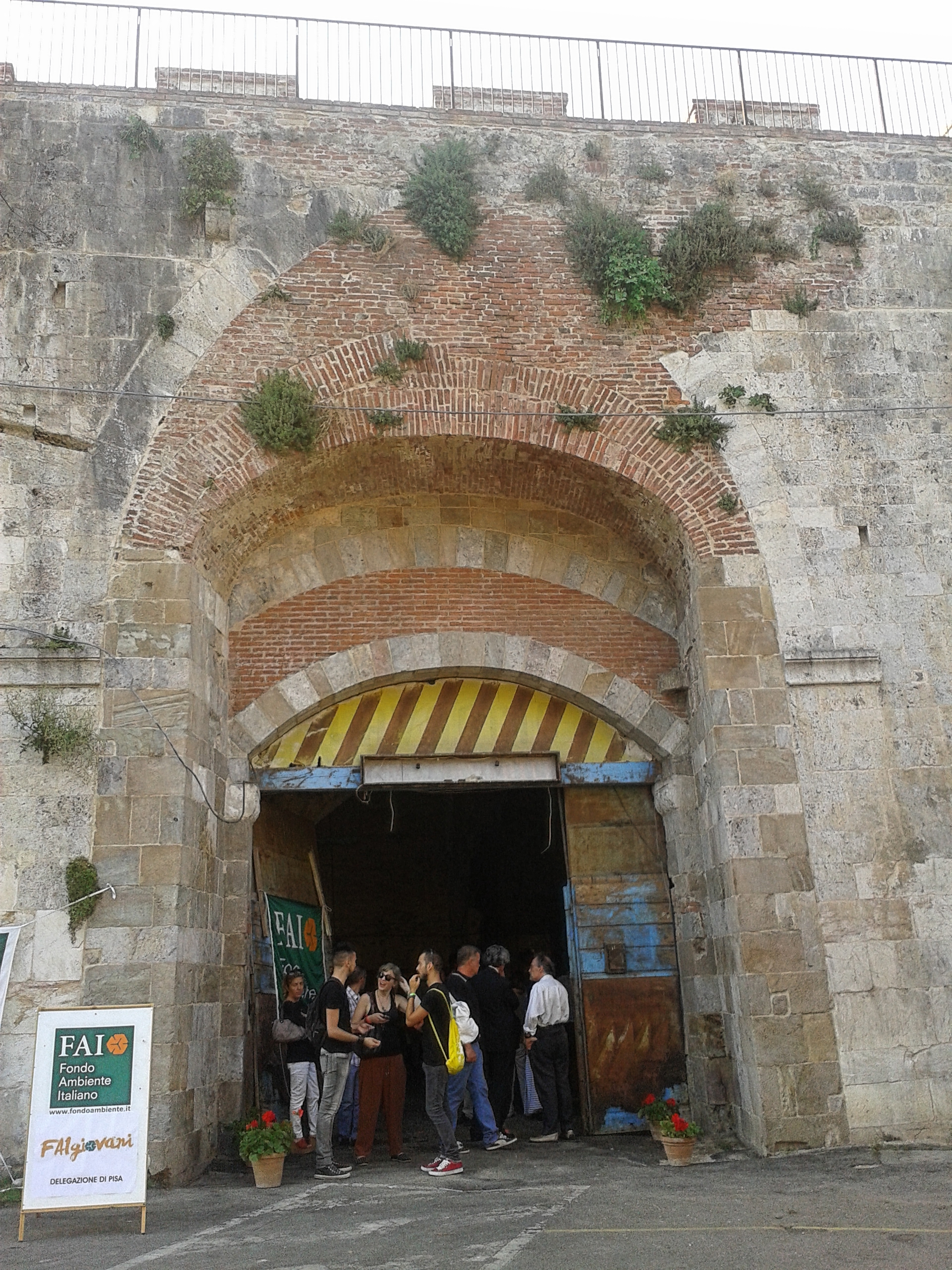 Porta del Parlascio durante un'apertura straordinaria del bastione omonimo presente sul lato opposto delle mura.